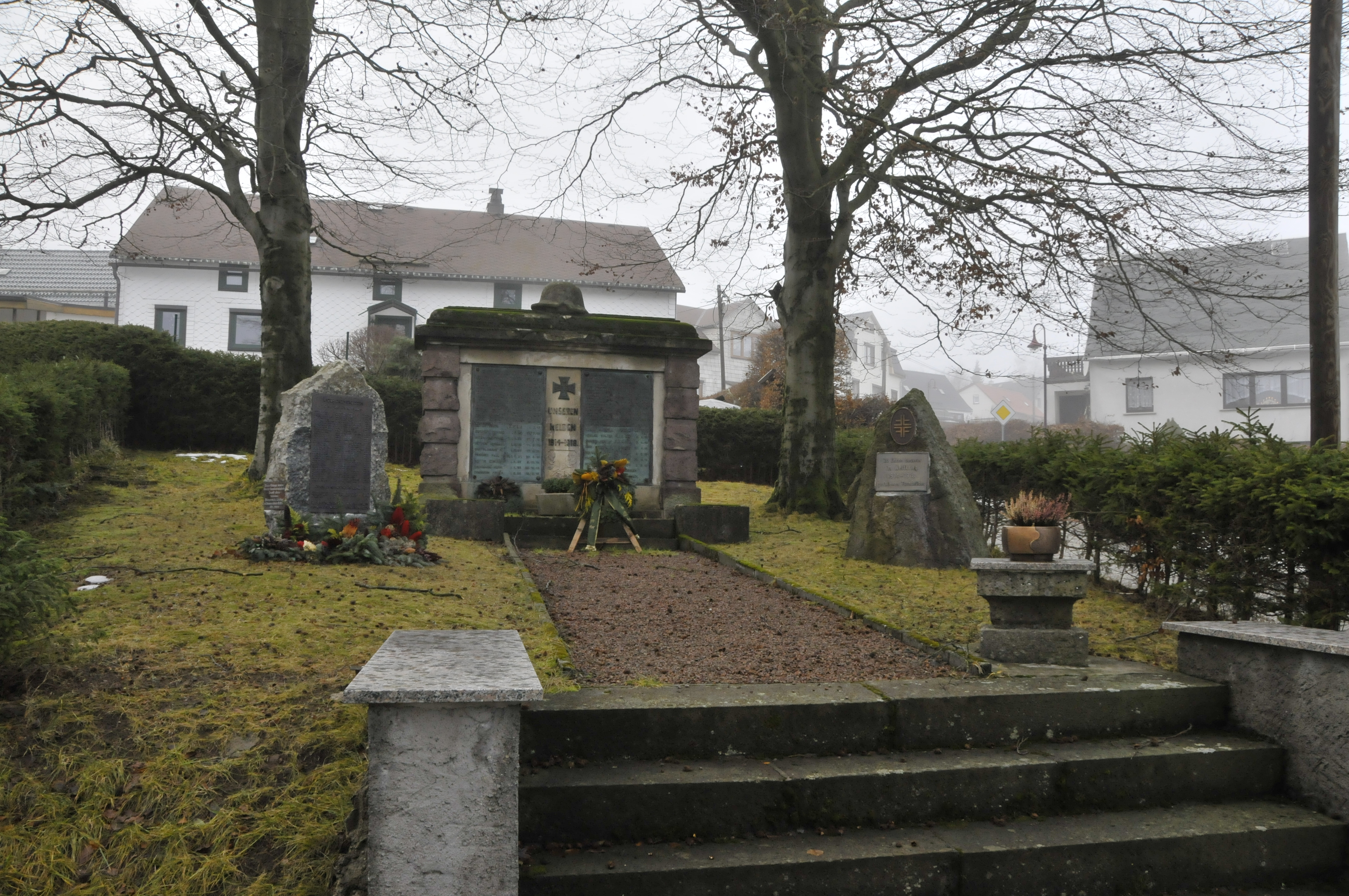 Gehlberg, Gefallenendenkmal